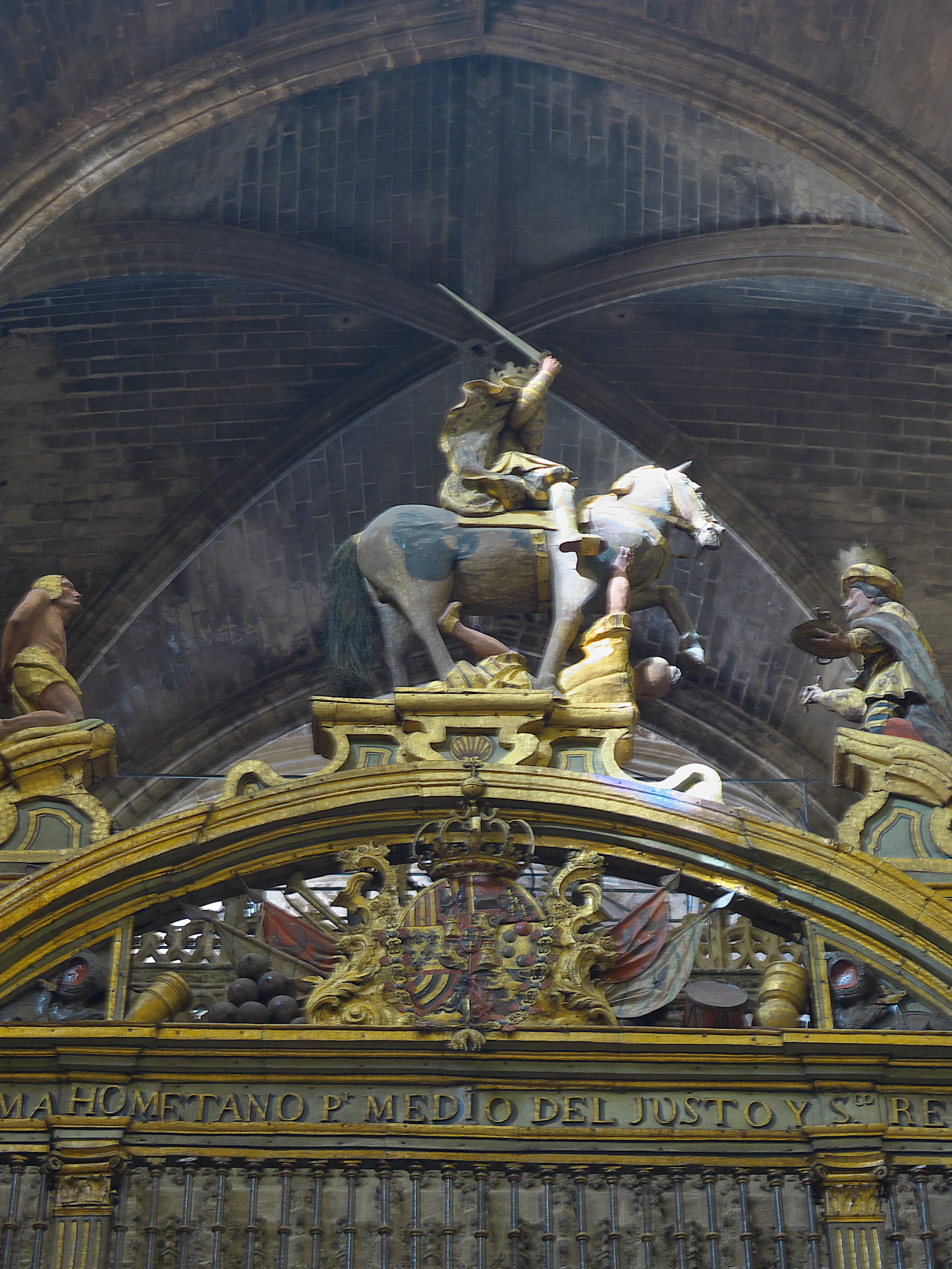 Grupo escultórico de Jerónimo Roldán colocado en el remate superior de la reja de Sebastián Van der Borcht que cierra la Capilla Real de la catedral de Sevilla.